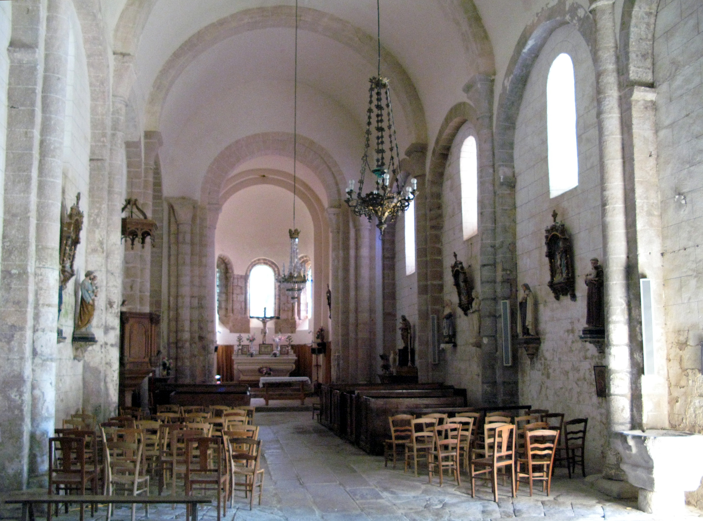 Nouziers (Creuse, France) - L'église (intérieur de la nef). . .